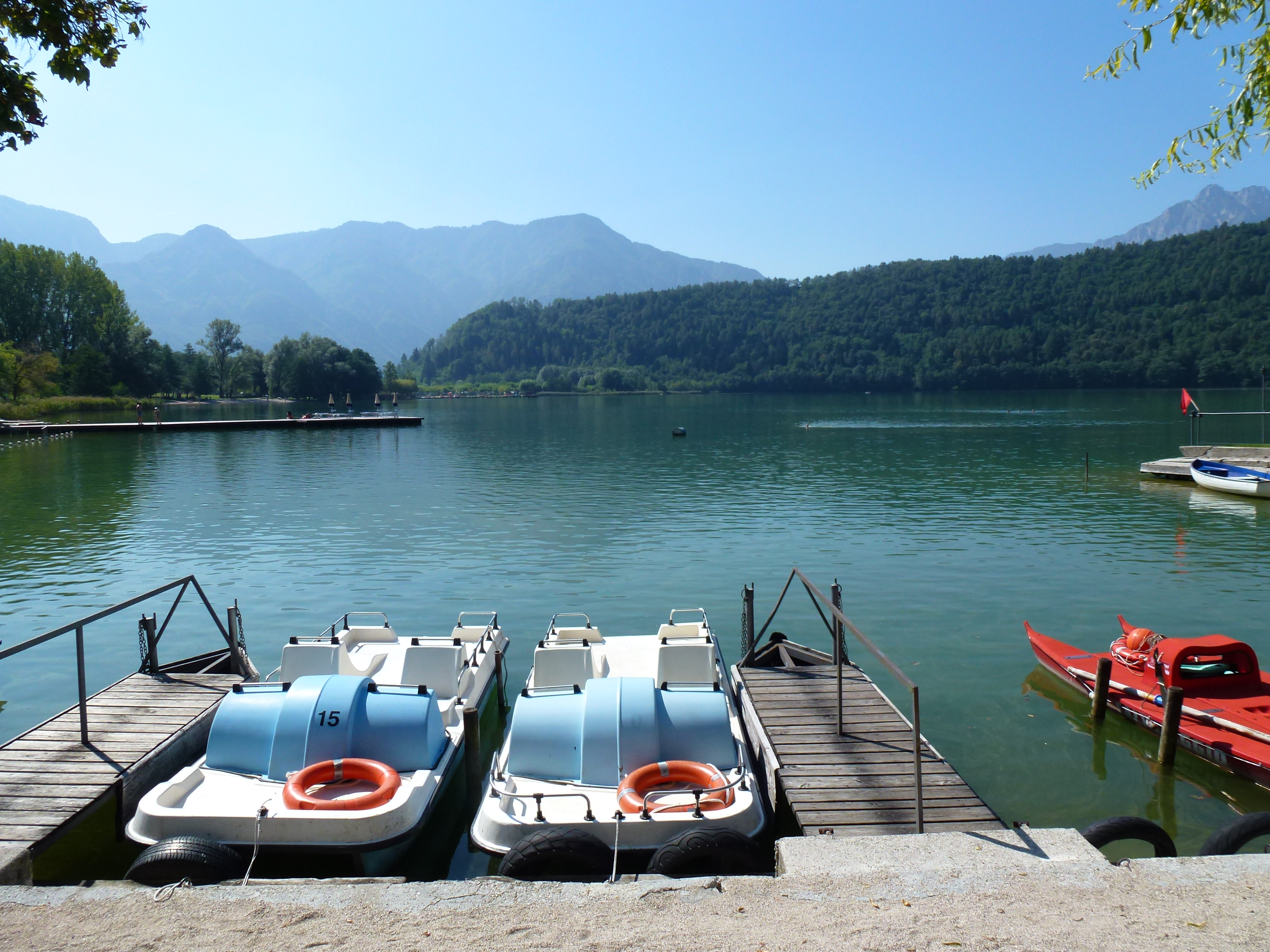 Am Ufer des Lago di Levico